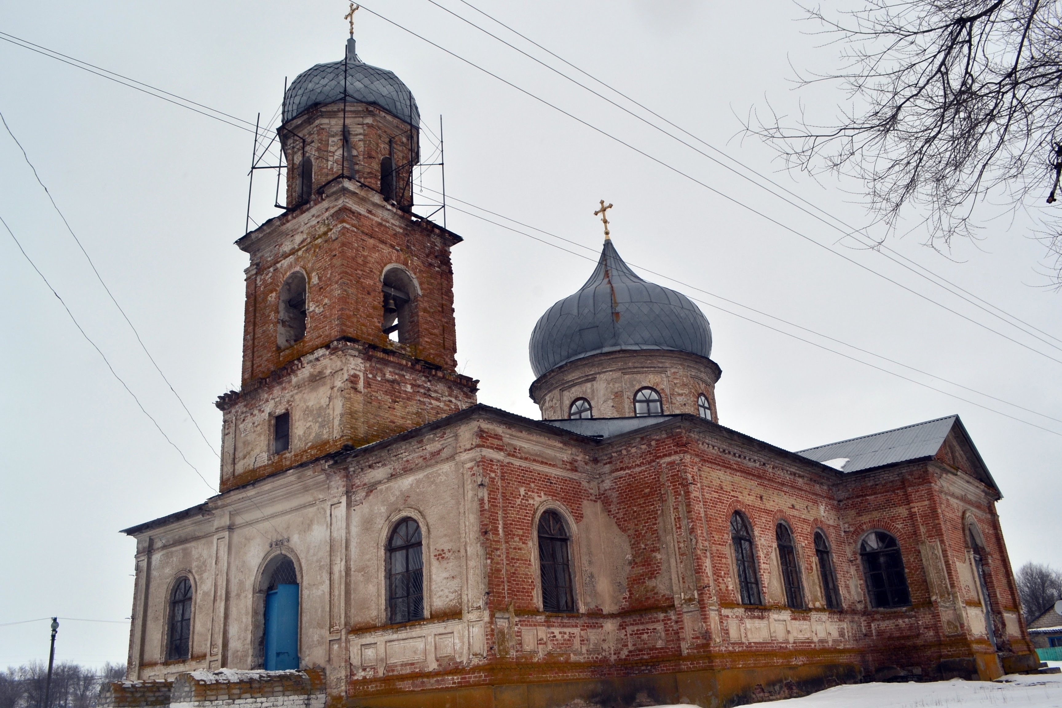 Свистунівка Луганська область 2018-03-10